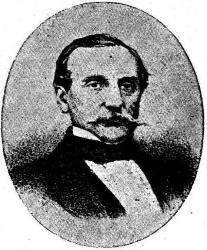 griechischer Militär, 19. Jahrhundert